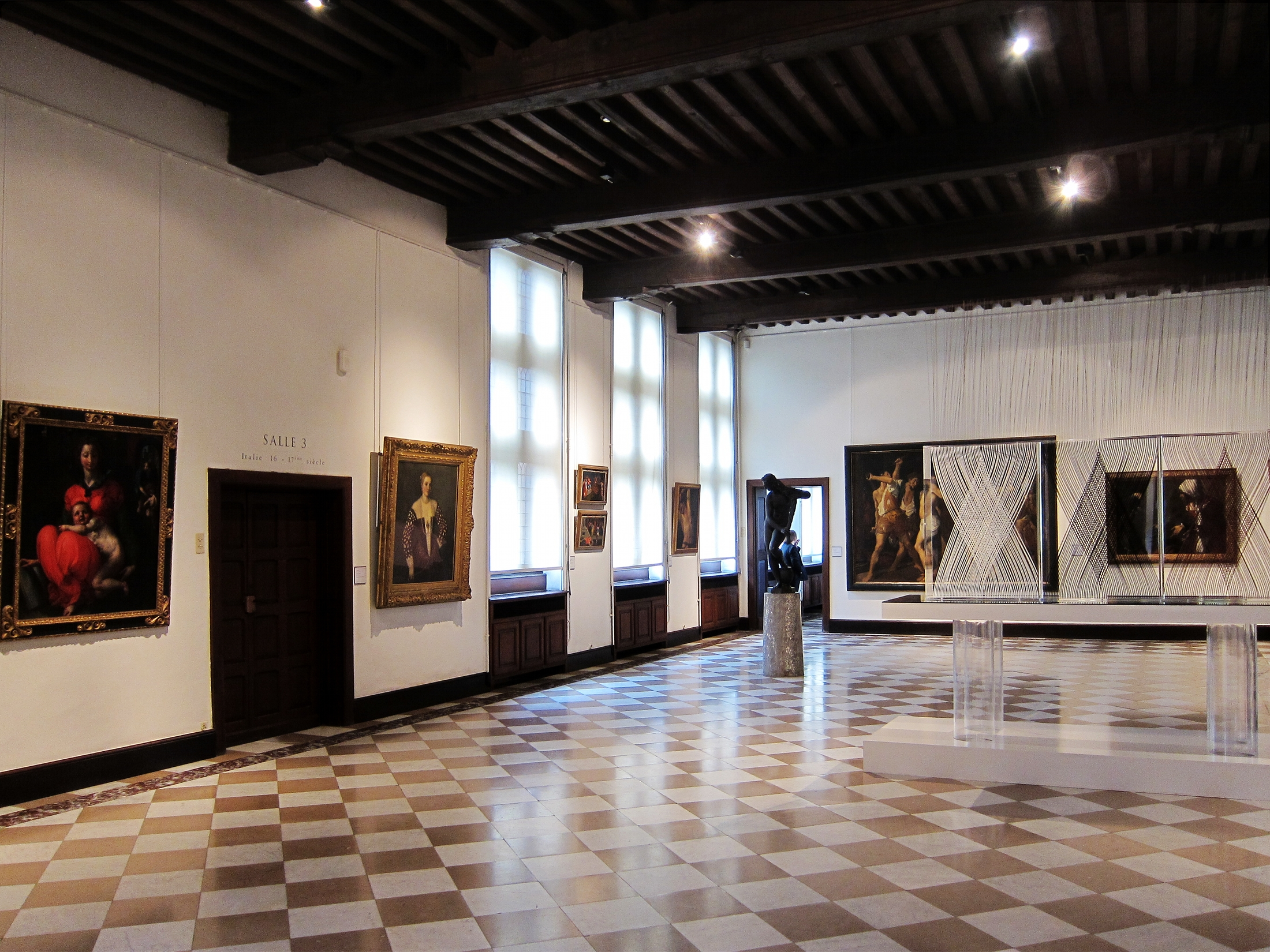 La salle 3 du musée de la Chartreuse de Douai.